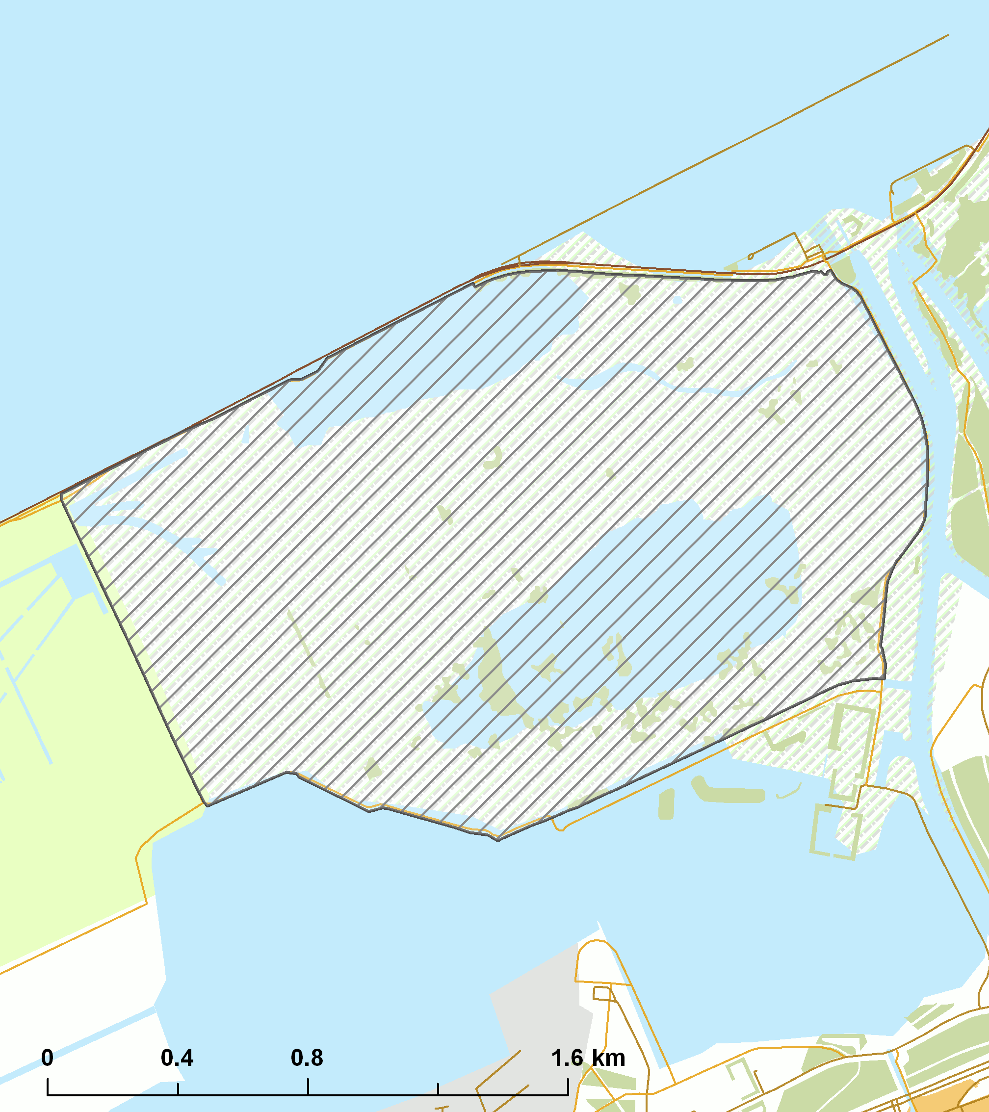 Natura2000 - Lepelaarplassen.png